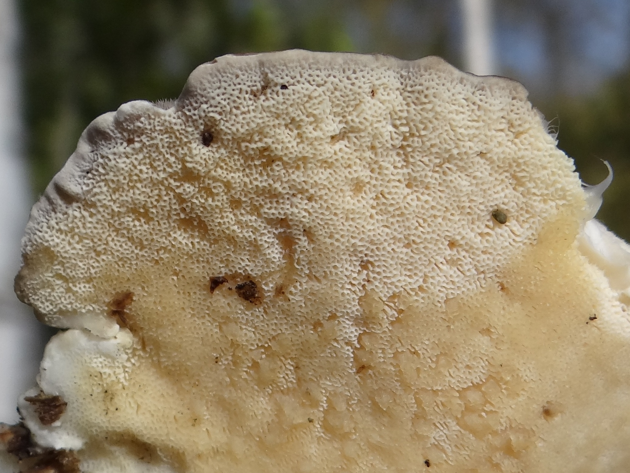 Cerrena unicolor (location: Poland, Kamionna (województwo małopolskie)